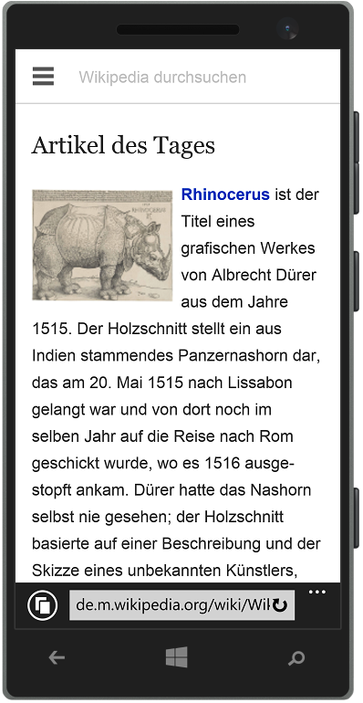 Smartphone mit der mobilen Startseite von Wikipedia